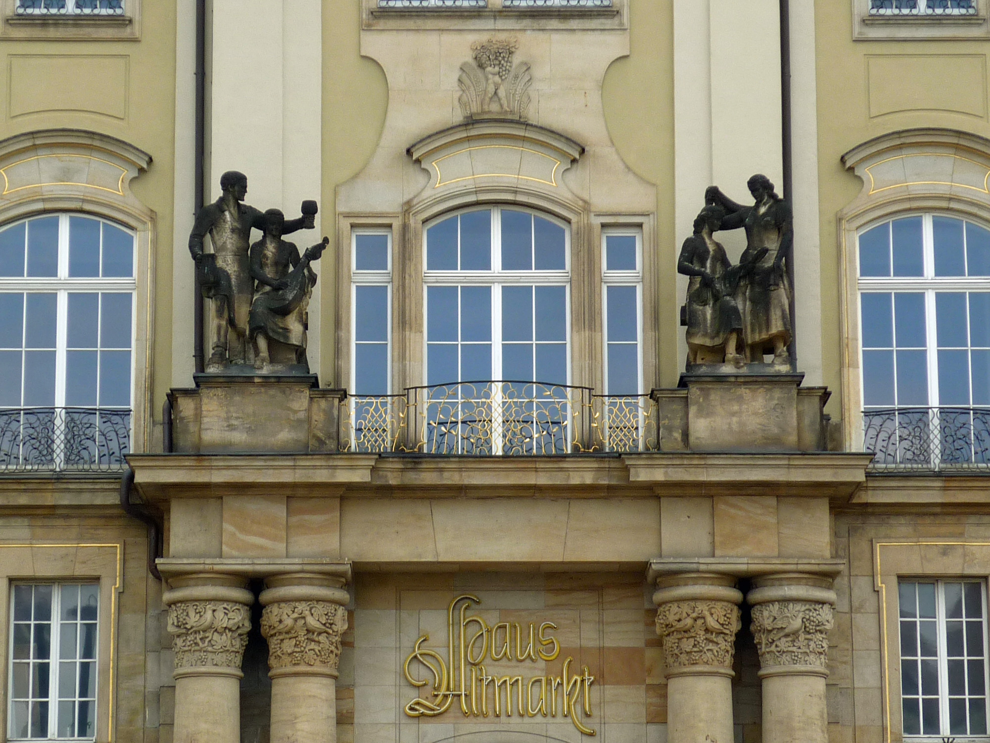 Zwei Skulpturengruppen über dem Portal vom Haus Altmarkt 1 (Ostseite) in Dresden (1955)